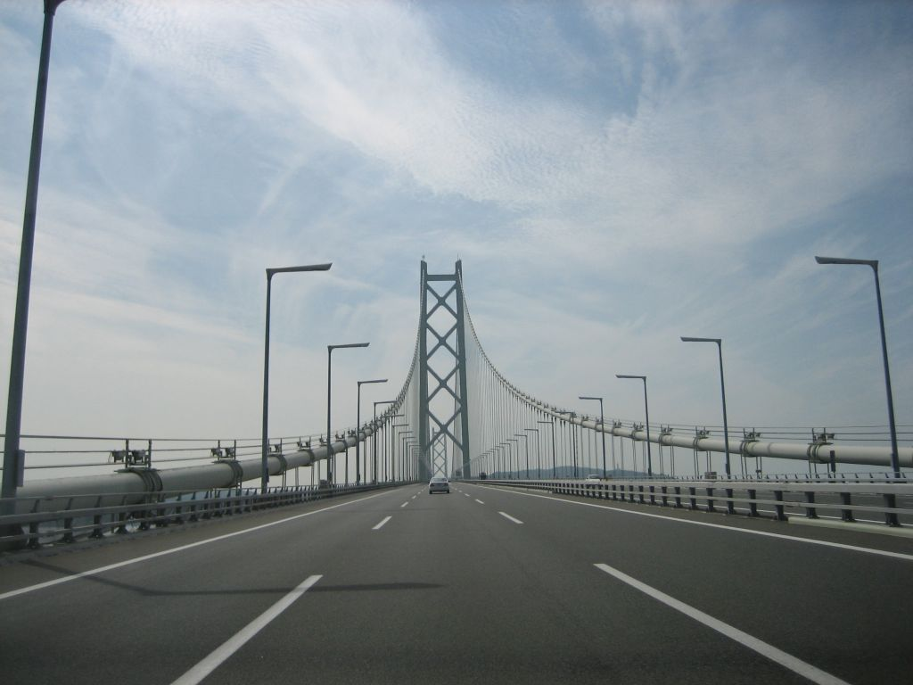 Road on Akashi Kaikyo Ohashi in Kobe, Japan